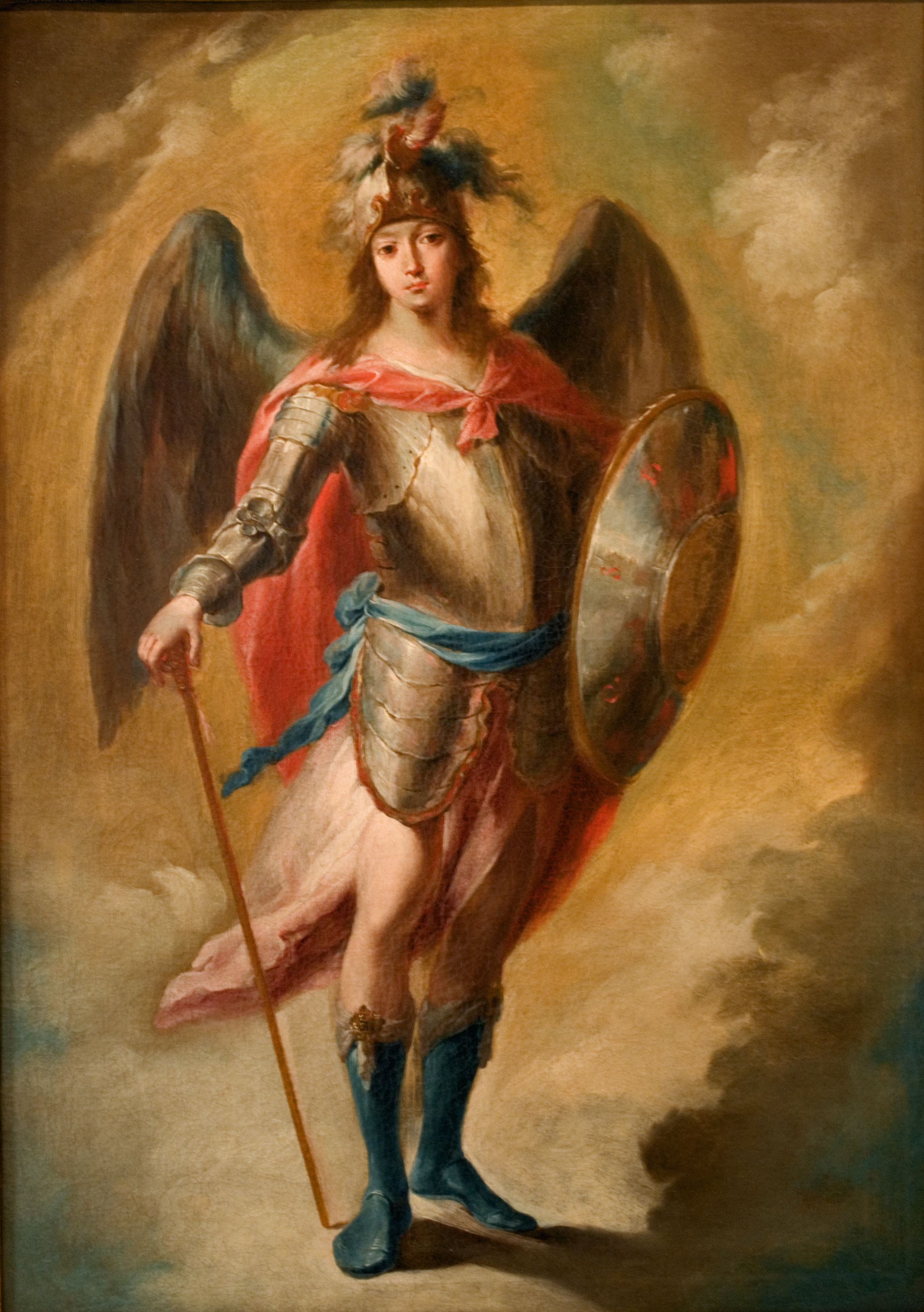 La obra representa al Arcángel San Miguel, y es una de las tres obras de Juan de Espinal que se conservan en el Museo de Bellas Artes de Sevilla.